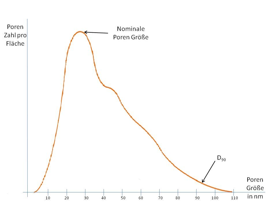 Porengröße und Verteilung einer fiktiven UF-Membran